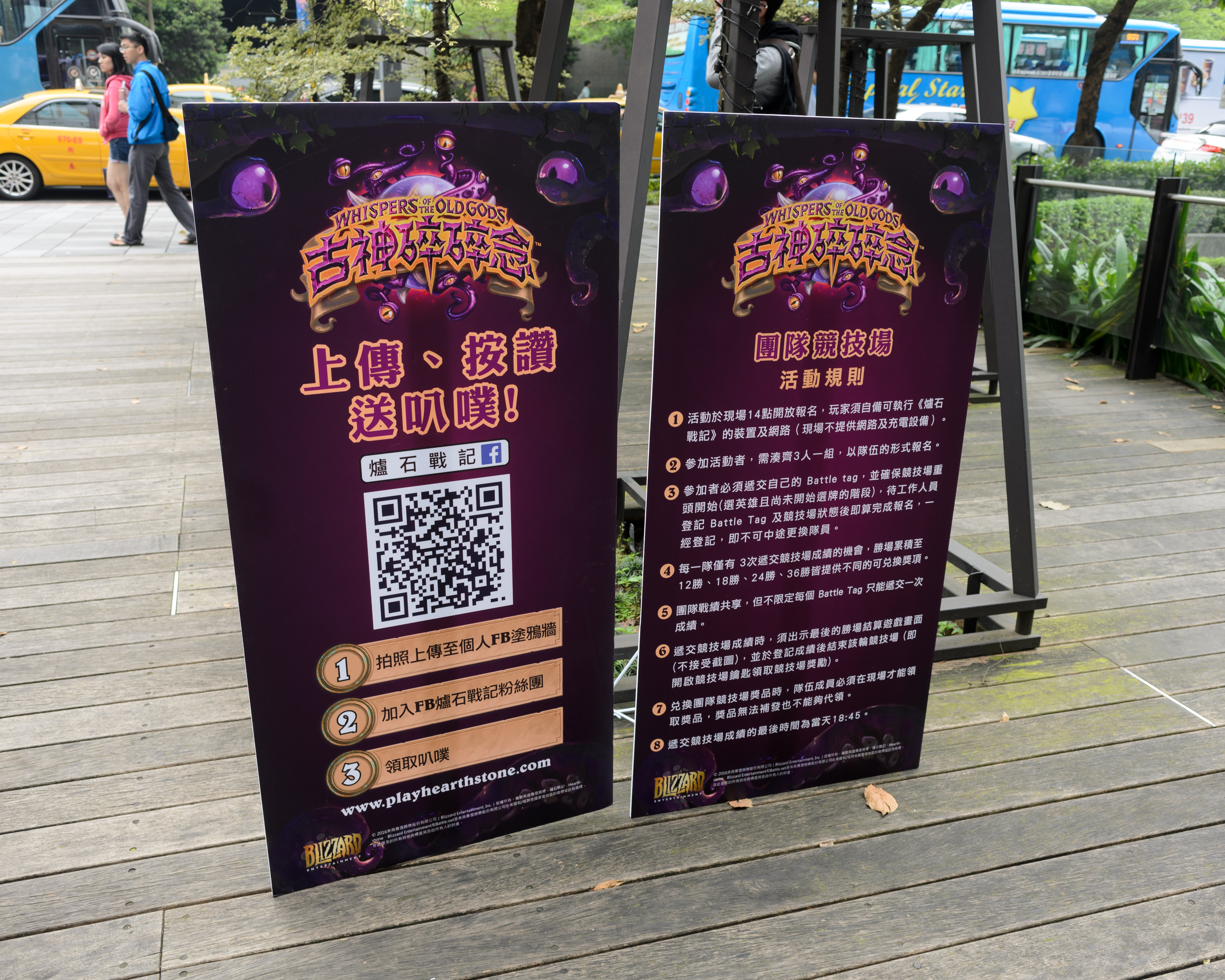 中文（台灣）: 活動現場說明對戰規則與於facebook公開照片獎勵的立牌。